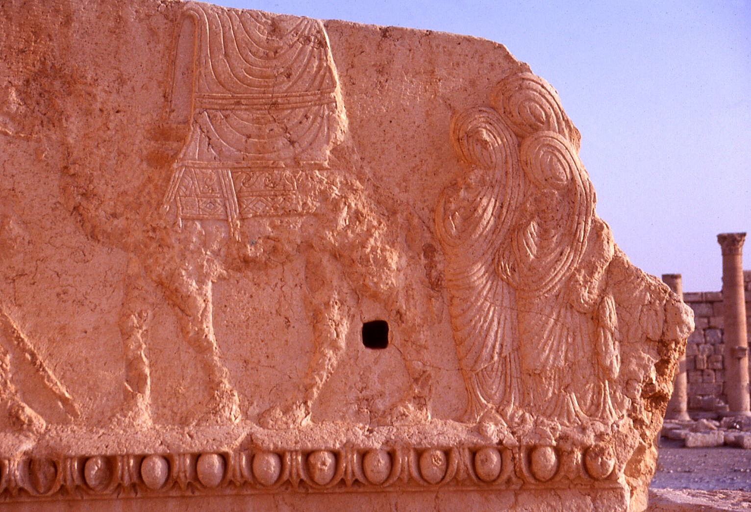 Palmyre, temple de Bel. Procession du bétyle dans une qubba sur un chameau. Les femmes se voilent à son passage. Ier siècle. Photo Ginolerhino 1992.